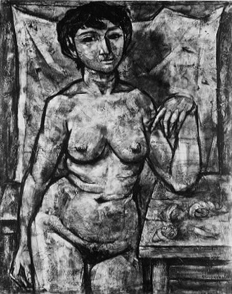 Femme nue accoudée à une table, peinture par Enrico Campagnola.